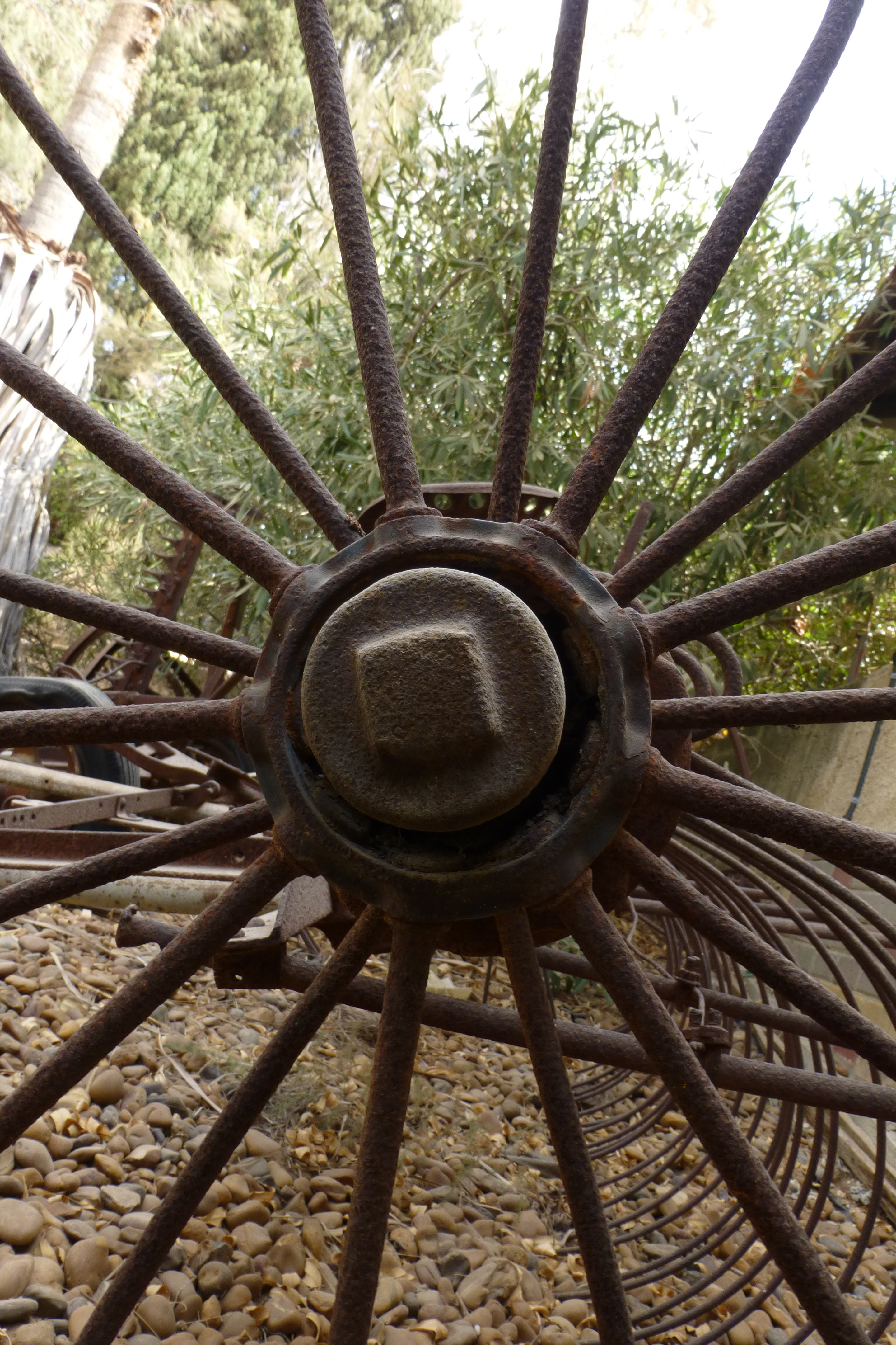 נבנה ב1924, על ידי משה ורחל מינץ. שימש בחלקו המערבי כבית מגורים ובחלקו המזרחי כבית עם. כיום הוא משכנו של מוזיאון לתולדות גדרה והביל"ויים.